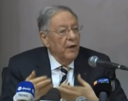 جمال ولد عباس الأمين العام لجبهتة التحرير الوطني